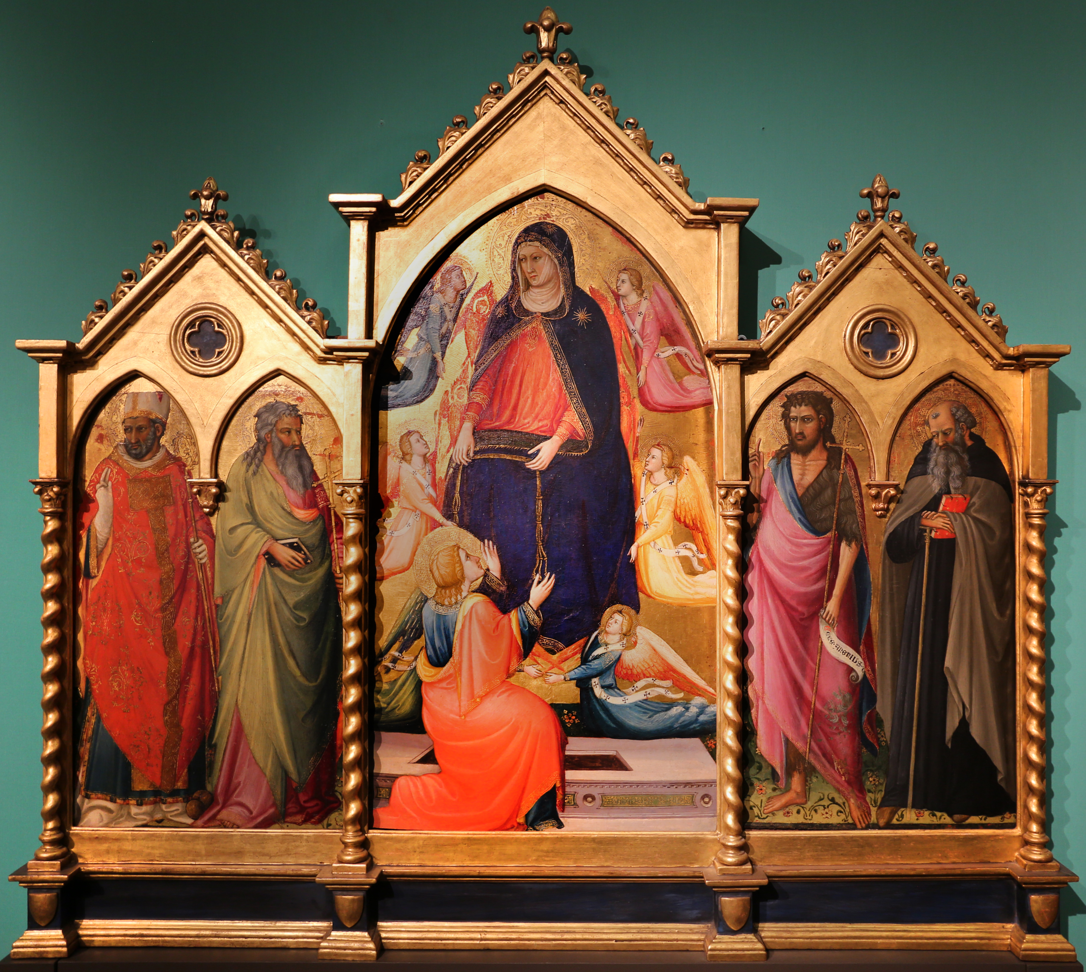 Museo civico (Prato) This is a photo of a monument which is part of cultural heritage of Italy.